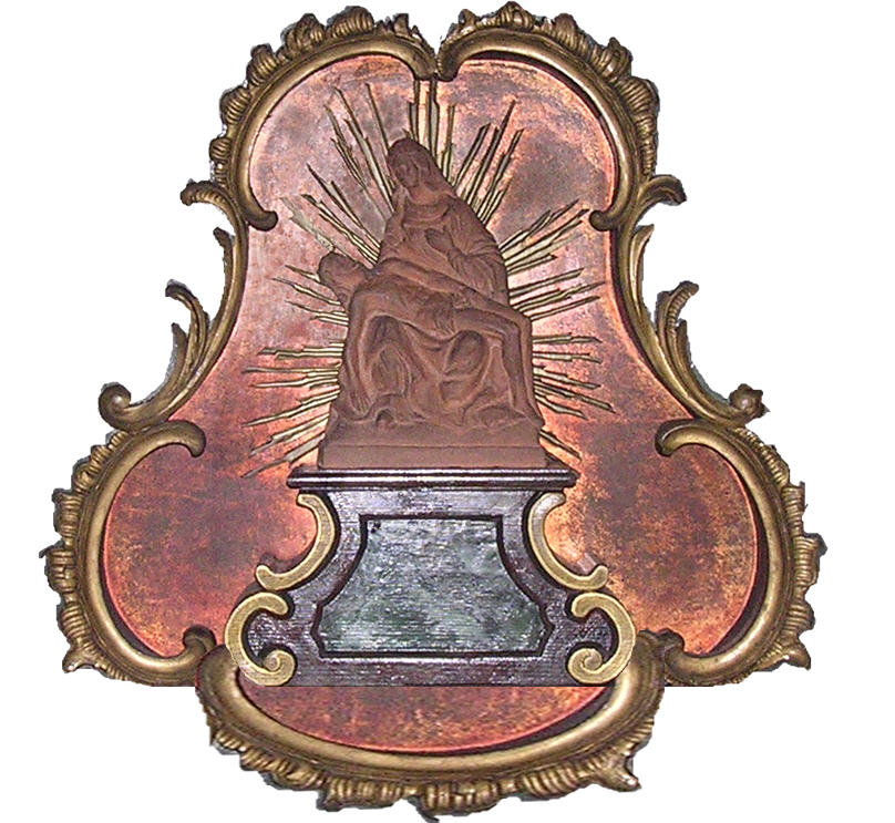 Obernauer Kapelle Maria Frieden Gnadenbild in der Altarnische (Montage)